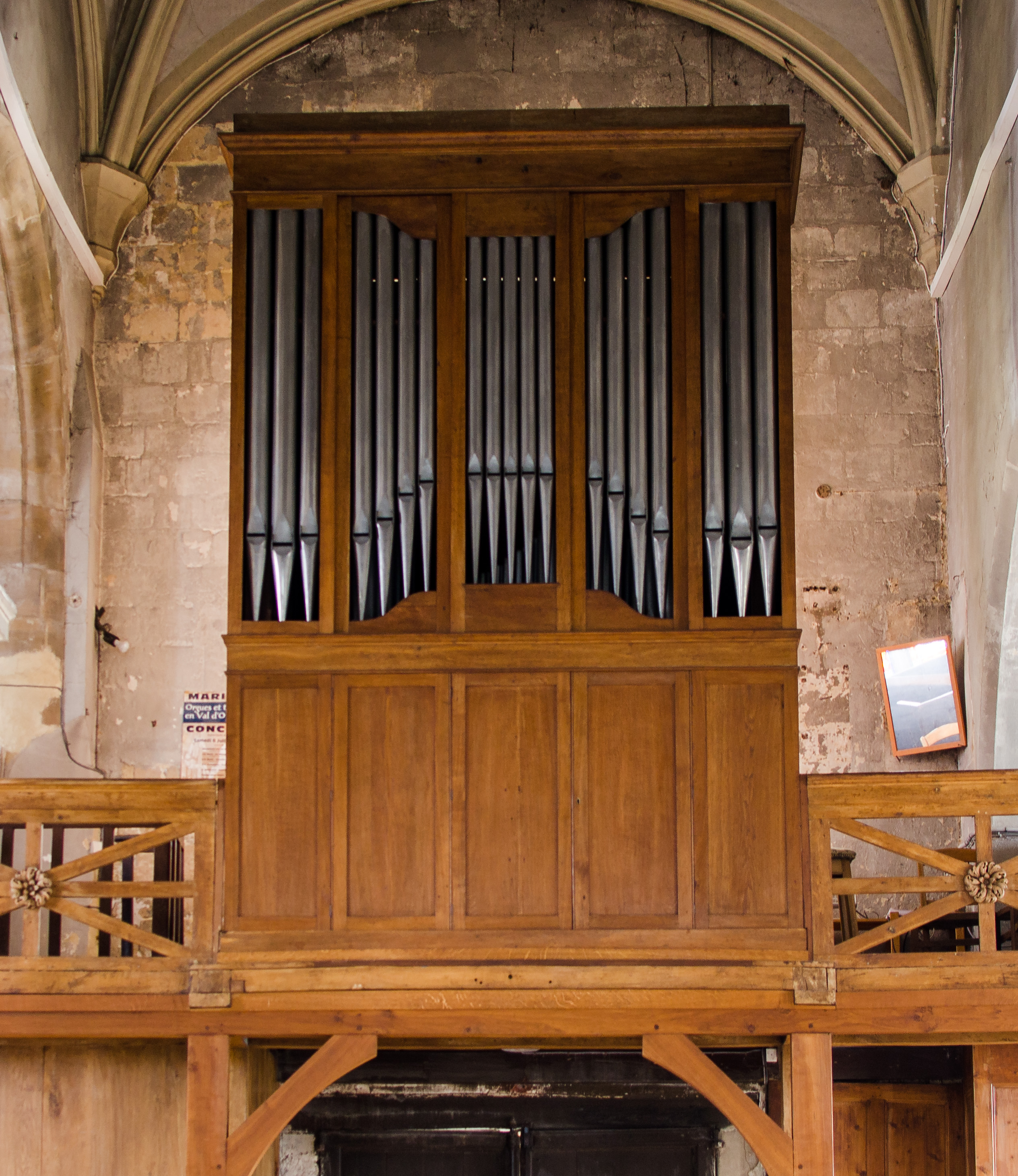 l'orgue de l'église de Marines